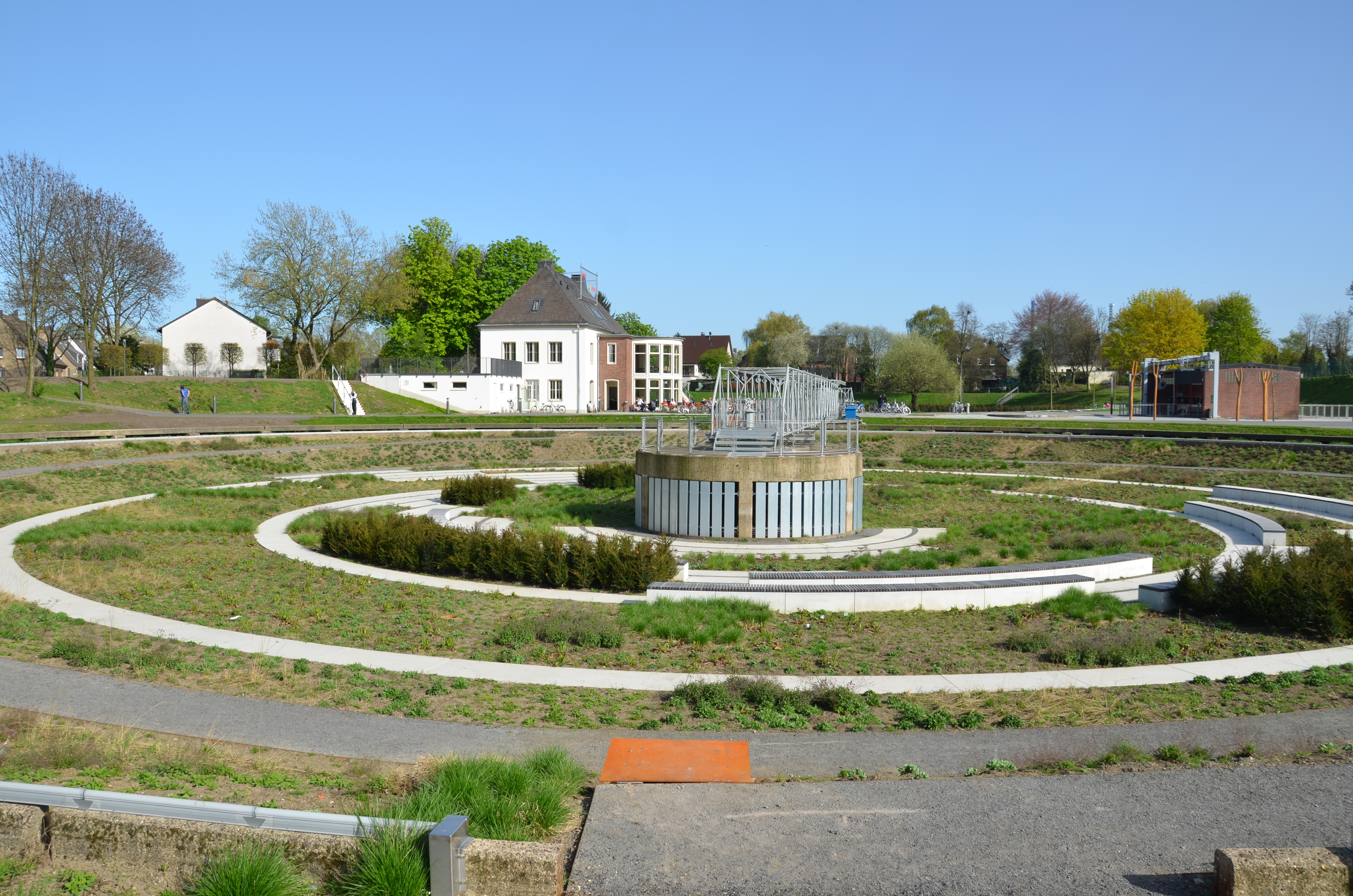 BernePark in Bottrop-Ebel an der Mündung der Berne in die Emscher, auf dem Gelände der ehemaligen Kläranlage Bernemündung